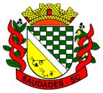 Blason de la municipalité de Saudades -SC - Brésil